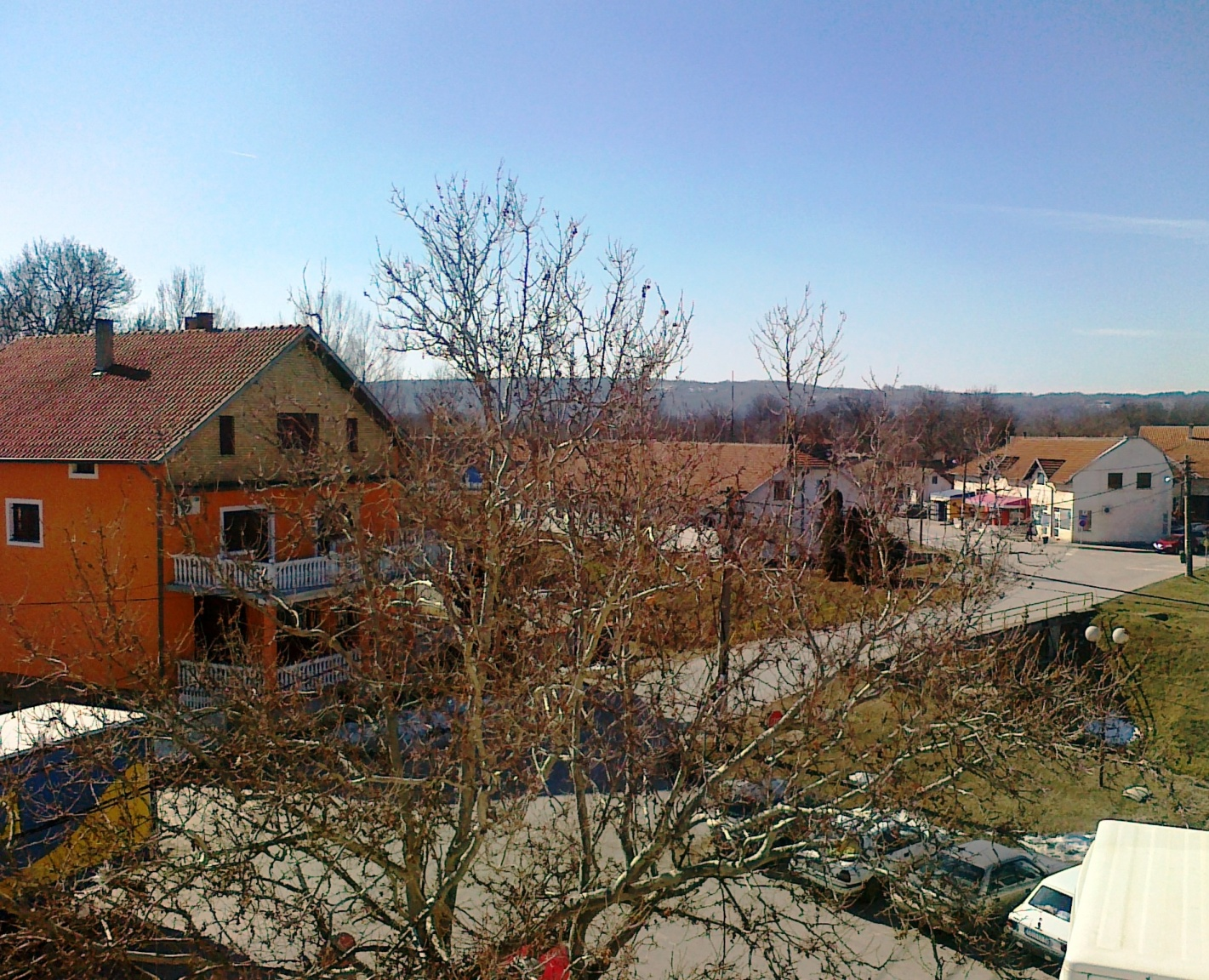 Мало Црниће - средиште.